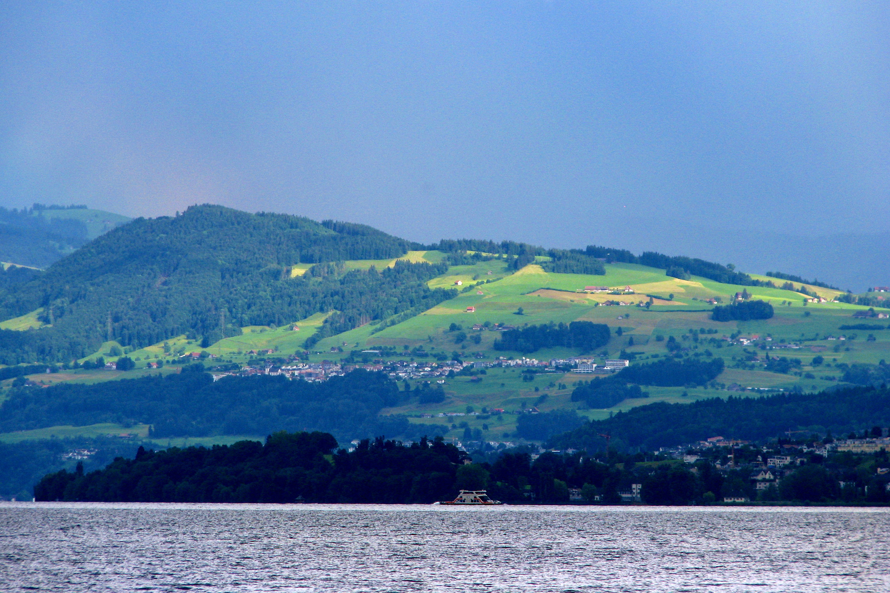 Etzel mountain and Feusisberg as seen from Lake Zürich (Switzerland)